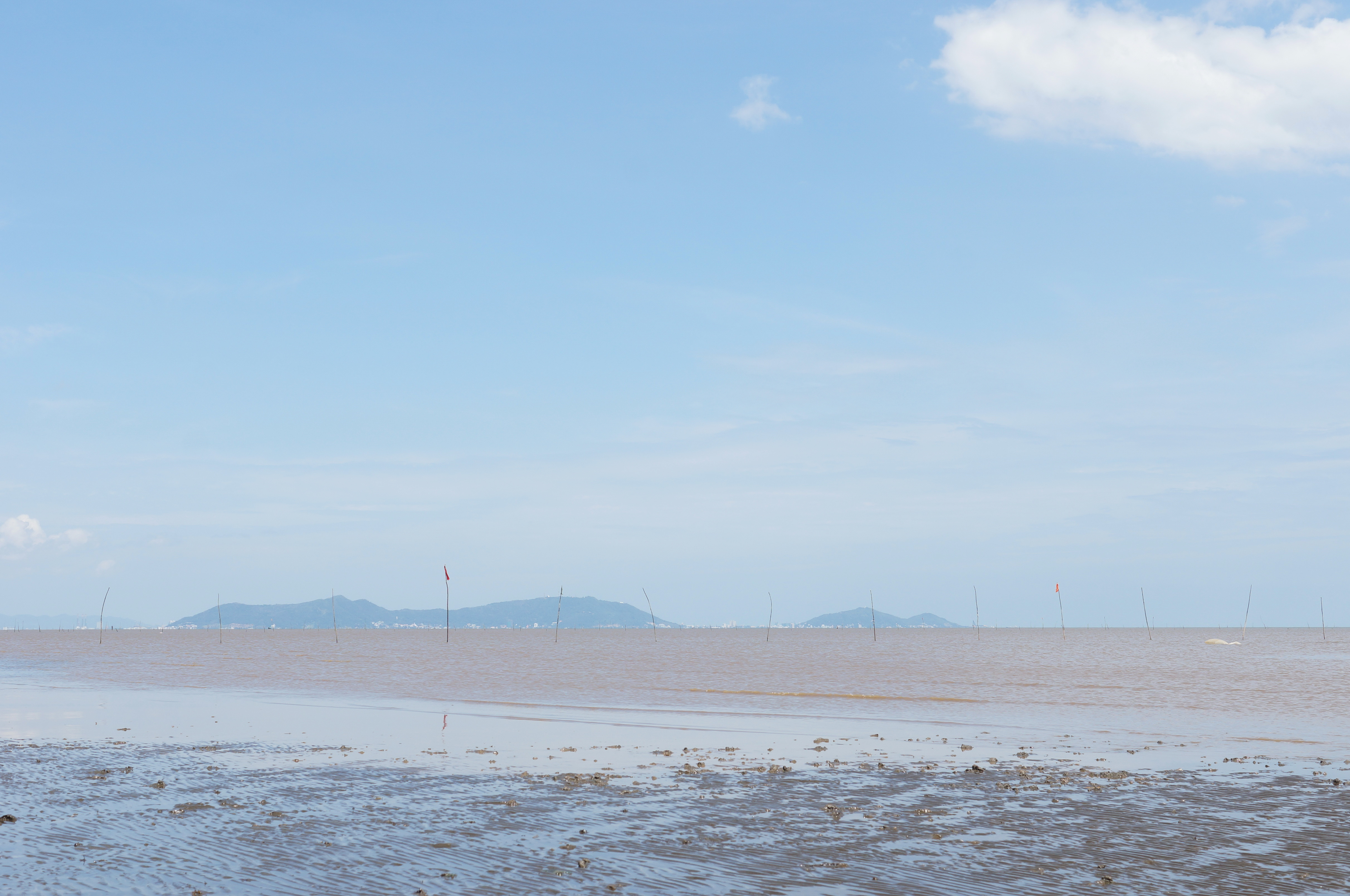 Bãi biển Cần Giờ nhìn sang tp Vũng Tàu từ Khu du lịch 30/4